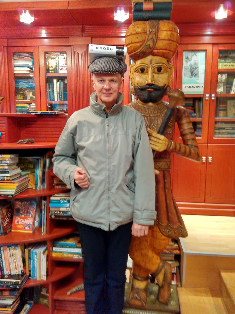 Др Андреј Борисович Базилевски (рус. Андрей Борисович Базилевский; Калуга, 24. јун 1957 — Москва, 4. мај 209), руски књижевник и члан Удружења Адлигат.